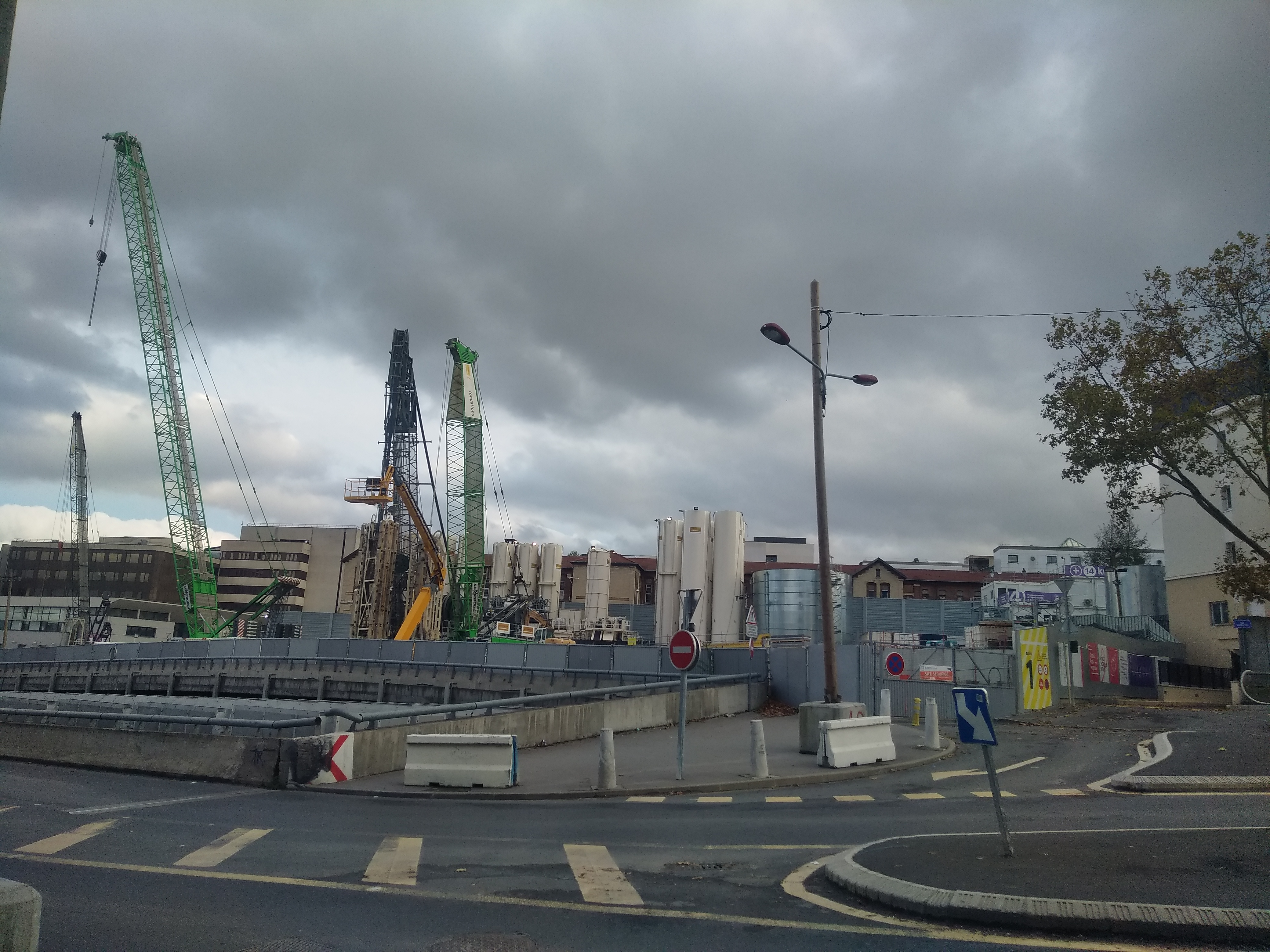 Travaux de création de la station Kremlin-Bicêtre hôpital (métro)